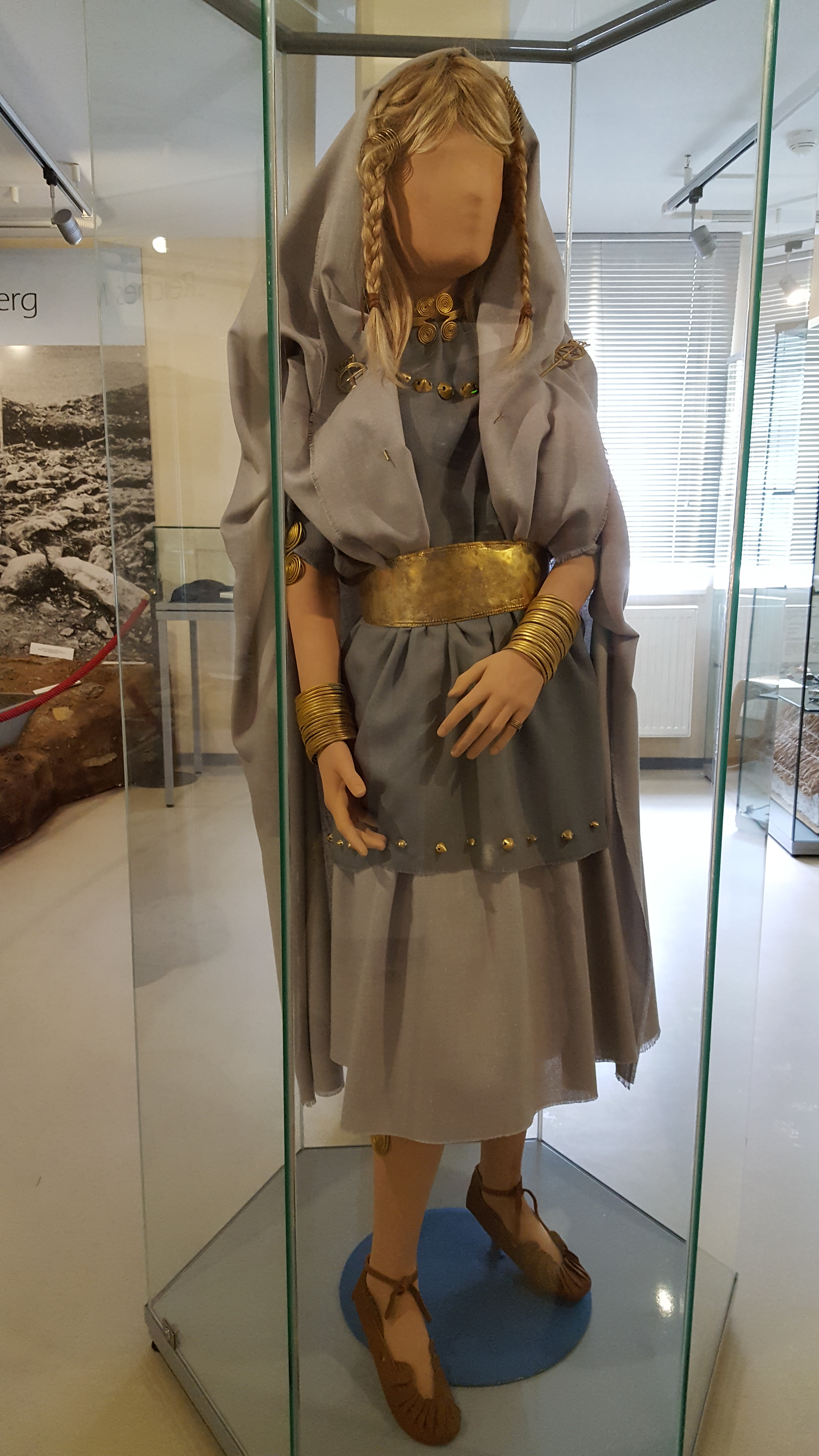 Lebensbild des Mädchen von Molzbach im Konrad-Zuse-Museum Hünfeld mit Stadt- und Kreisgeschichte